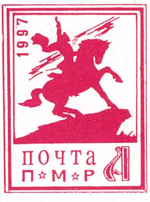 Source: Post of Transnistria